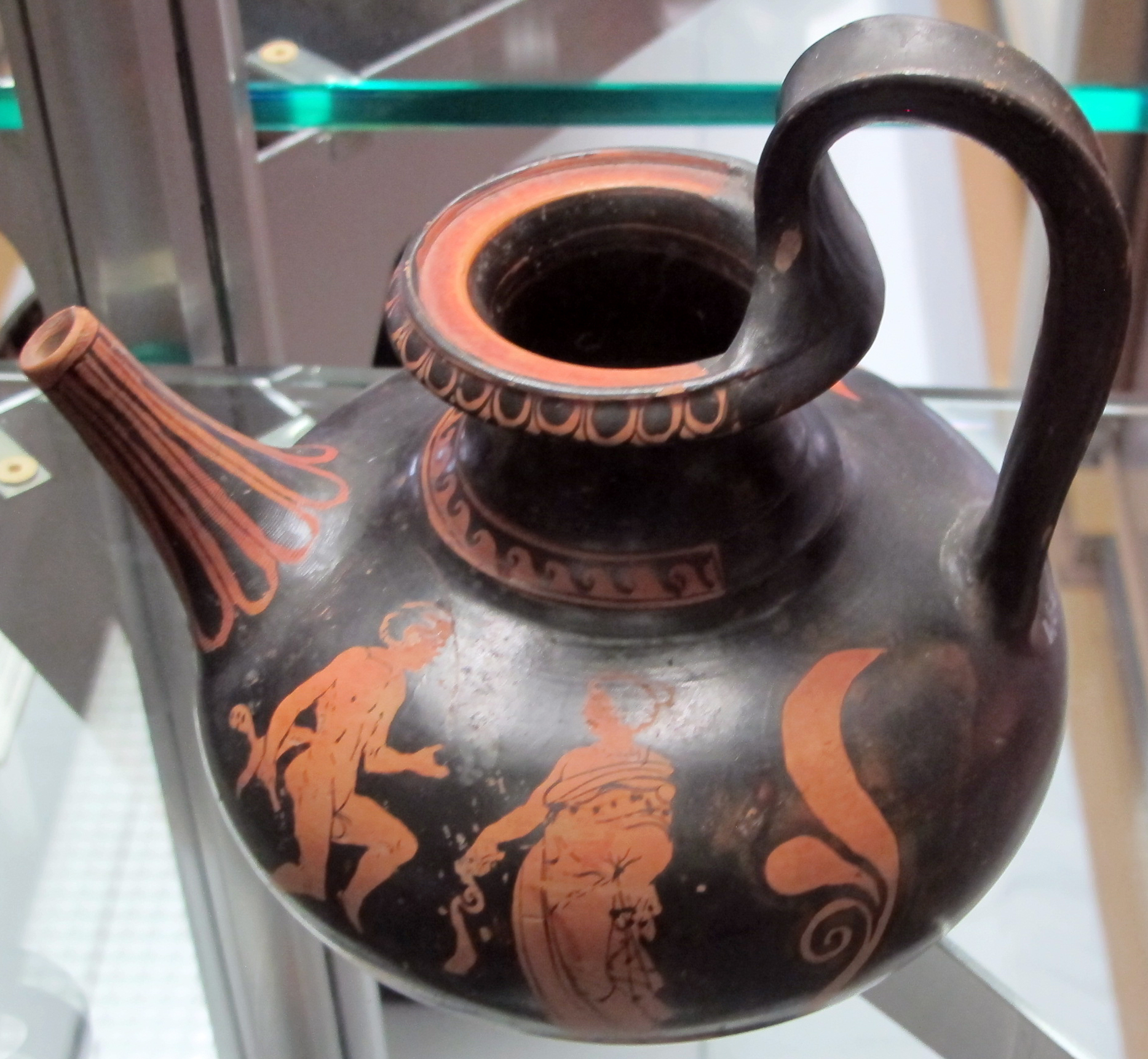 Apulia, guttus lucano a figure rosse da ruvo, con due giovani (A) , satiro e menade (B), 420-370 ac.